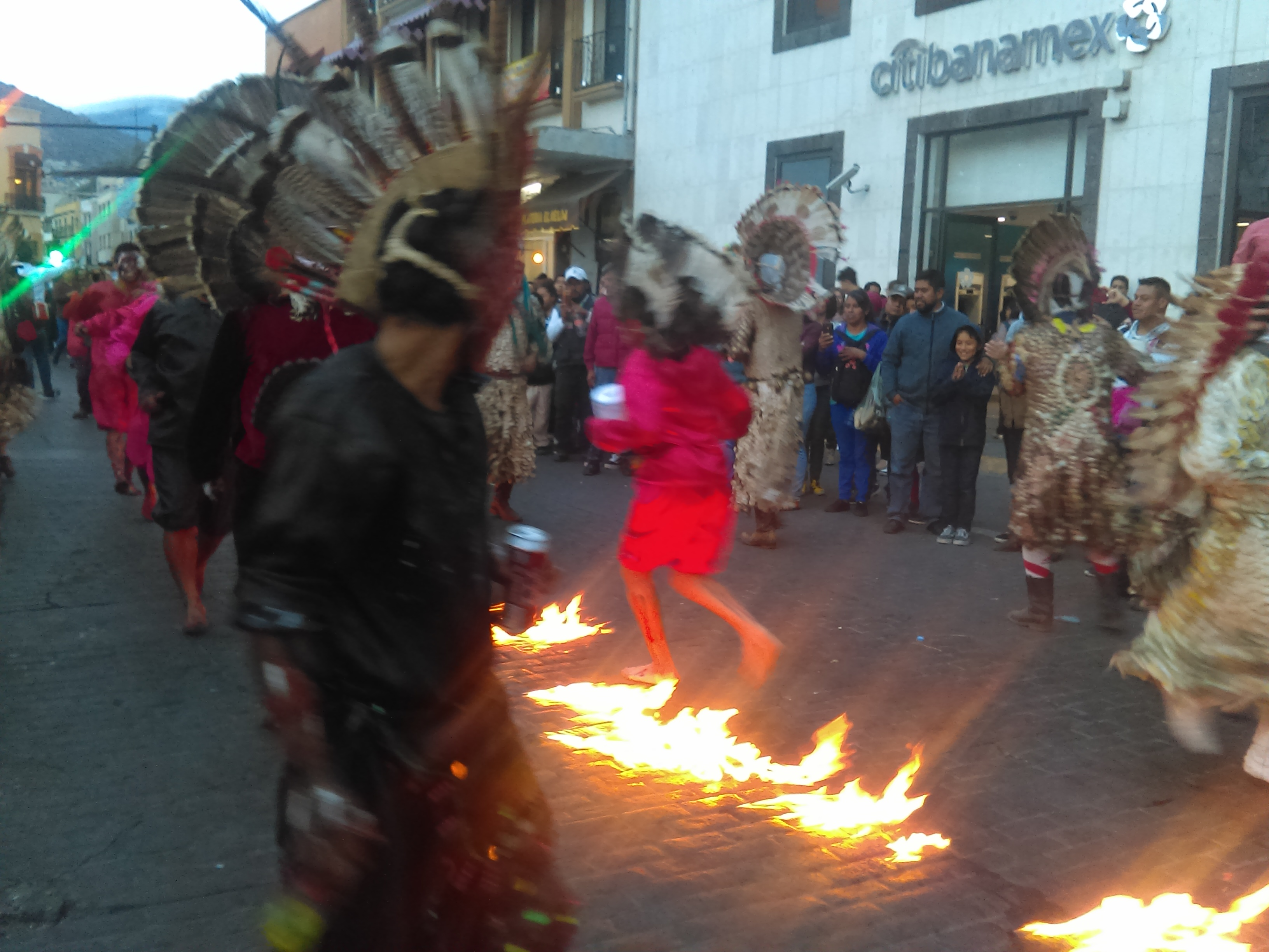 Desfile "Magia de los Carnavales de Hidalgo" en Pachuca de Soto (2020).